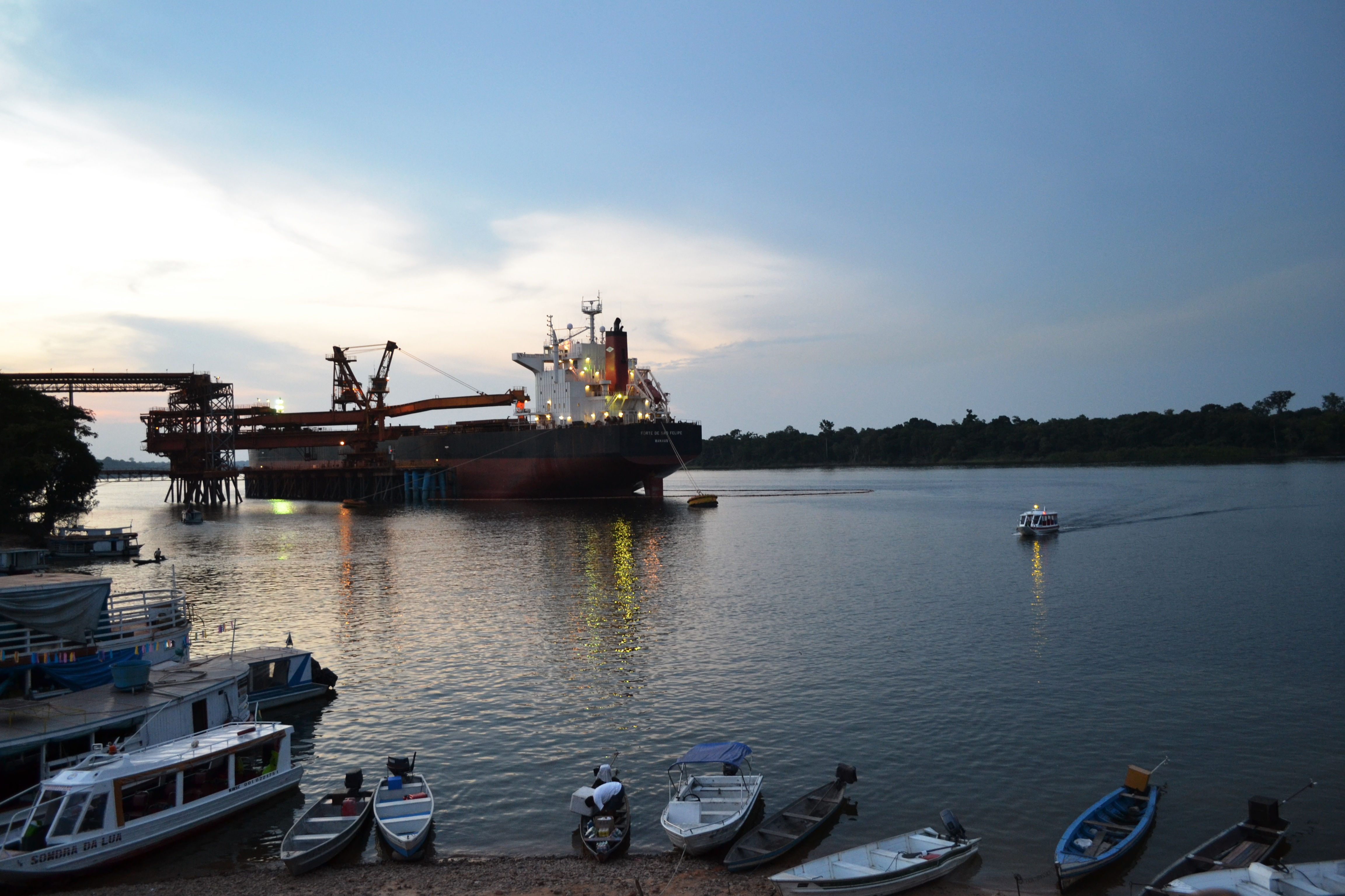 Porto Trombetas está localizada no Noroeste do estado do Pará. A vila foi construída para atender aos trabalhadores da Mineração Rio do Norte (MRN), que faz extração de bauxita. As instalações de Porto Trombetas estão localizadas no município de Oriximiná (PA), à margem direita do rio Trombetas, um dos afluentes do rio Amazonas. A Reserva Biológica do Trombetas (Rebio Trombetas), criada por Decreto Federal em 21 de setembro de 1979, também é preservada com apoio da Mineração Rio do Norte. A Mineração Rio do Norte é parceira do Instituto Chico Mendes de Conservação da Biodiversidade (ICMBio) na preservação da reserva. Anualmente, a empresa destina recursos financeiros que auxiliam o Instituto na fiscalização e no desenvolvimento de atividades de educação ambiental junto às comunidades que habitam a reserva. A área de 385 mil hectares da Rebio Trombetas é berço da reprodução de quelônios no projeto Tartarugas da Amazônia, executado numa parceria do ICMBio, Instituto de Pesquisas da Amazônia (INPA), Petrobras Ambiental, Prefeitura Municipal de Oriximiná, Polícia Militar do Pará, Mineração Rio do Norte (MRN) e as comunidades ribeirinhas da reserva. Mais informações